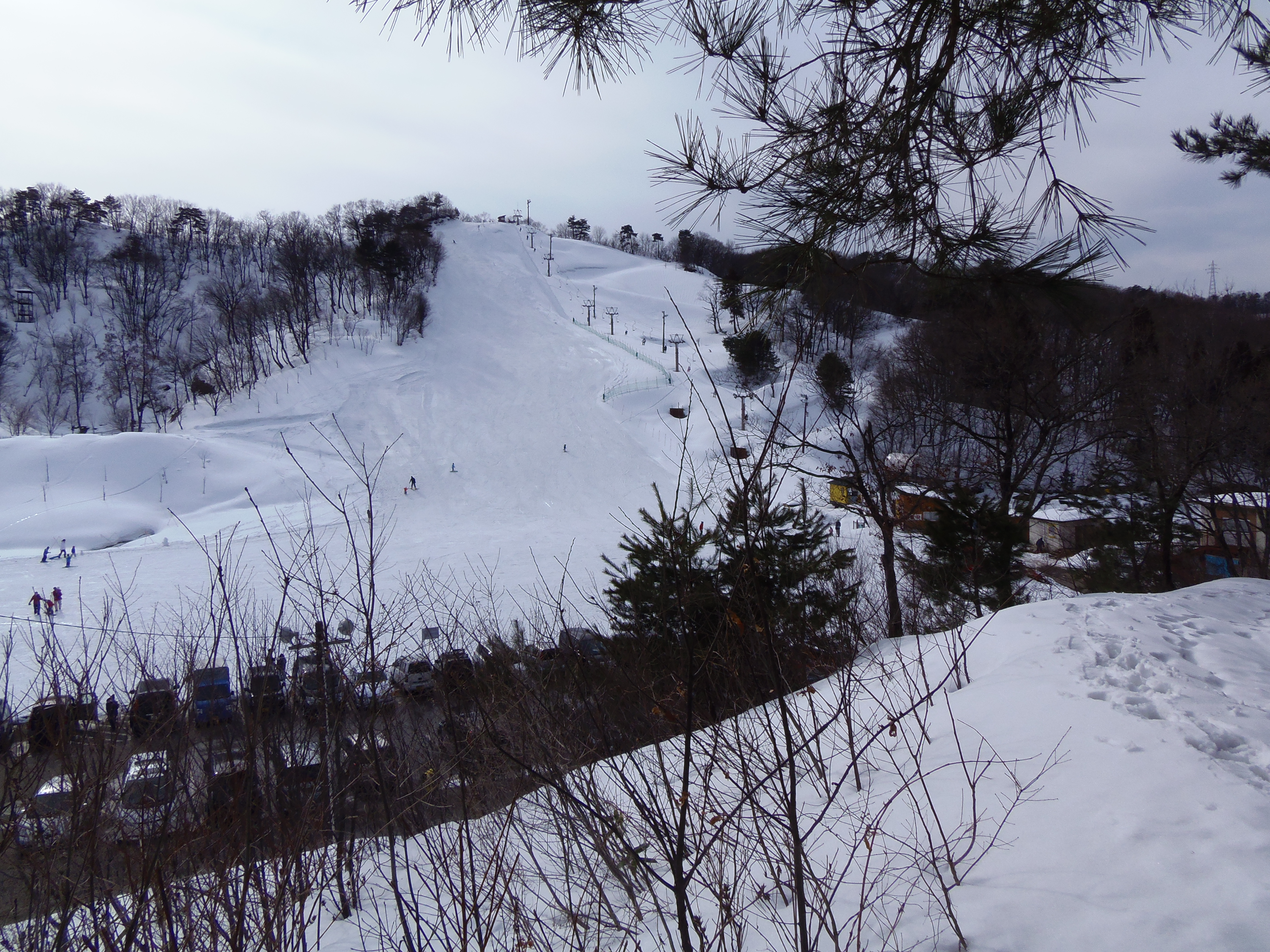 金谷山スキー場（西側、新潟県上越市大貫）